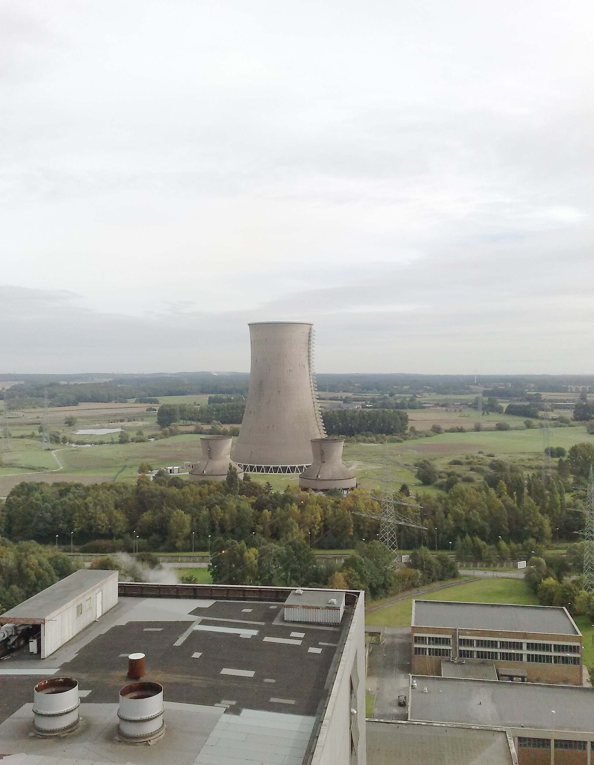 THTR-300. Blick auf den Kühlturm des Kohleblocks. Rechts davon ist noch der Standort des abgerissenen Trockenkühlturms zu erkennen.